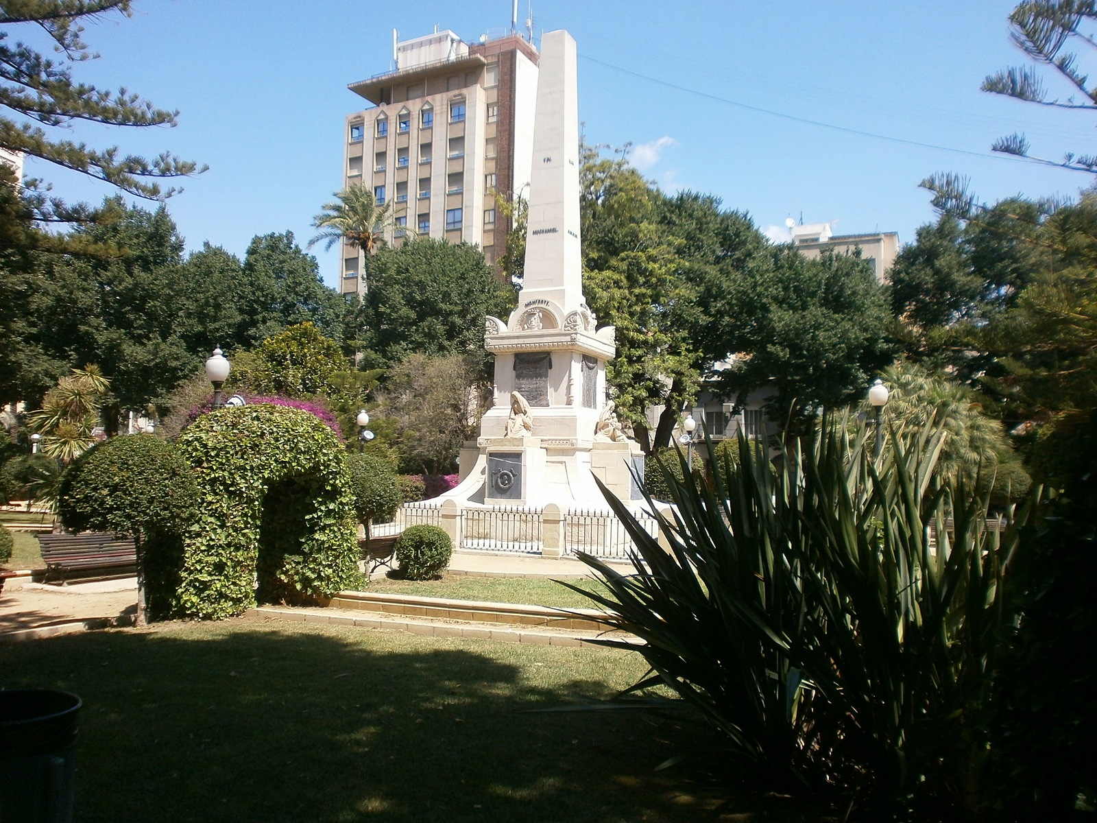 Parque de Quijano, Alicante, España.